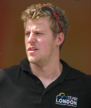 Clemens Rapp beim Empfang der Olympia-Teilnehmer des Teams London der Metropolregion Rhein-Neckar 2012.